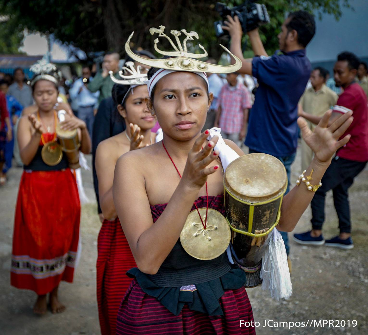 Frau in traditioneller Kleidung in Suai